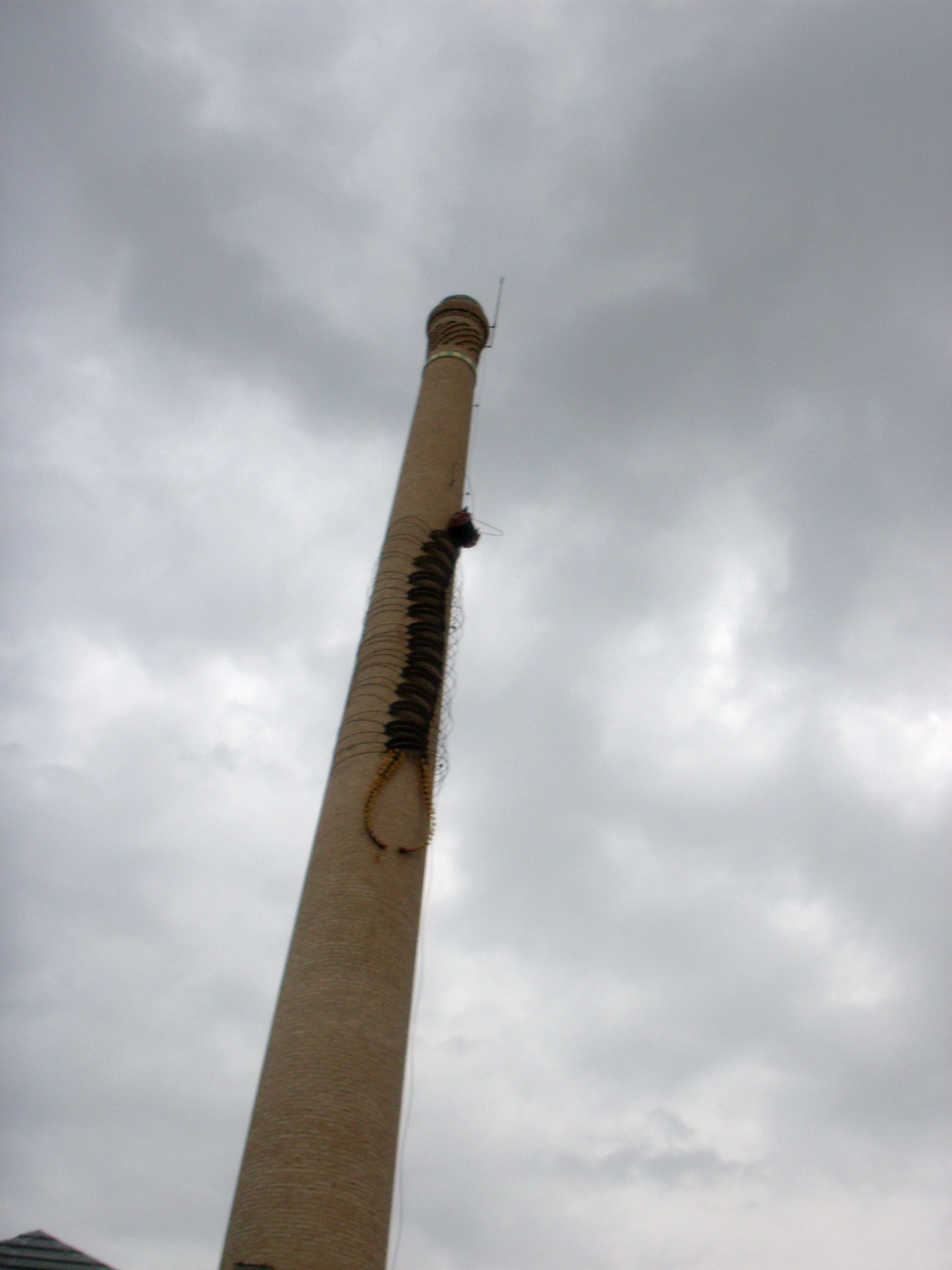 Escolopendra (Flyppy) en CeutImagina